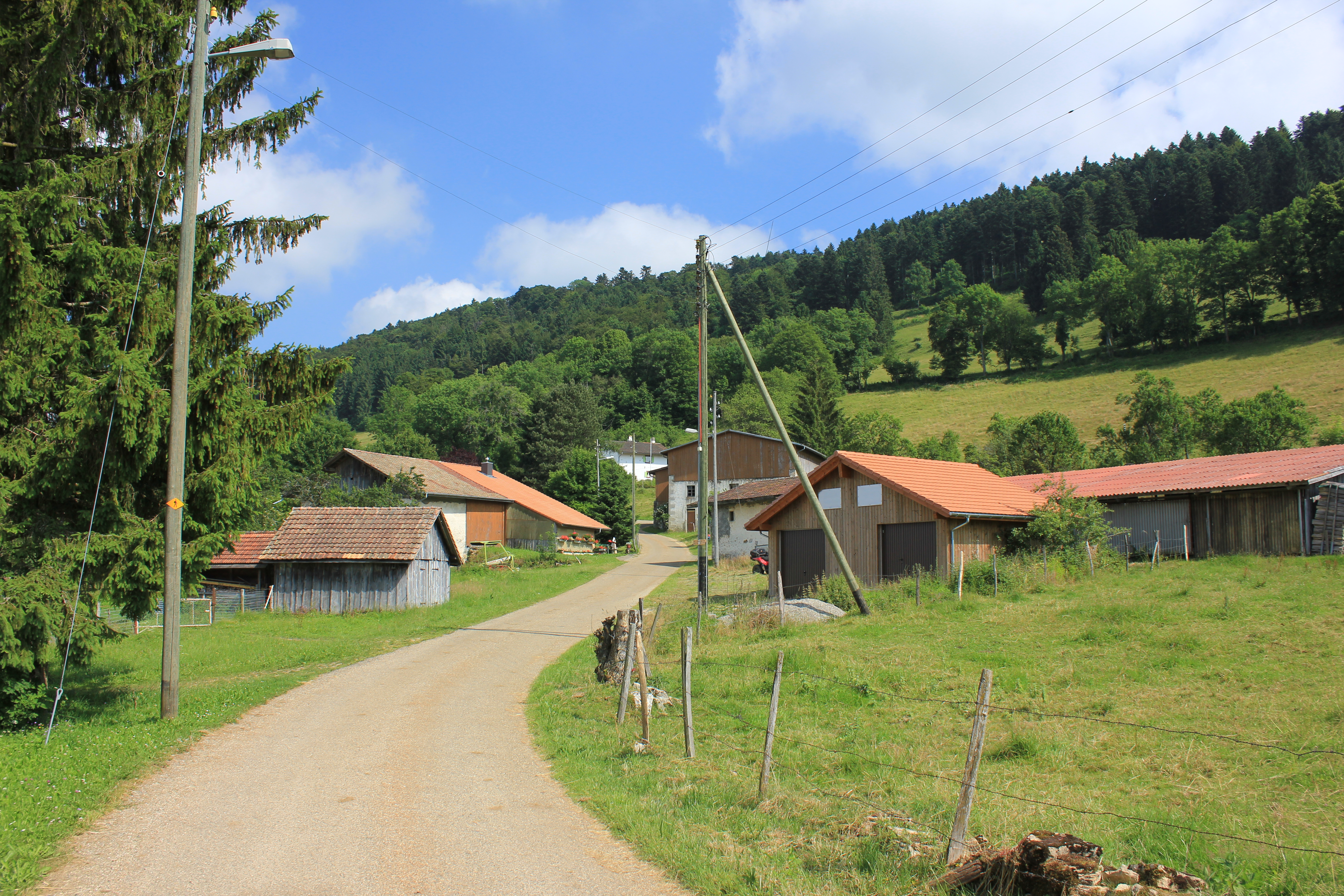 Strasse durch Montfavergier, Gemeinde Montfaucon, Kanton Jura, Schweiz